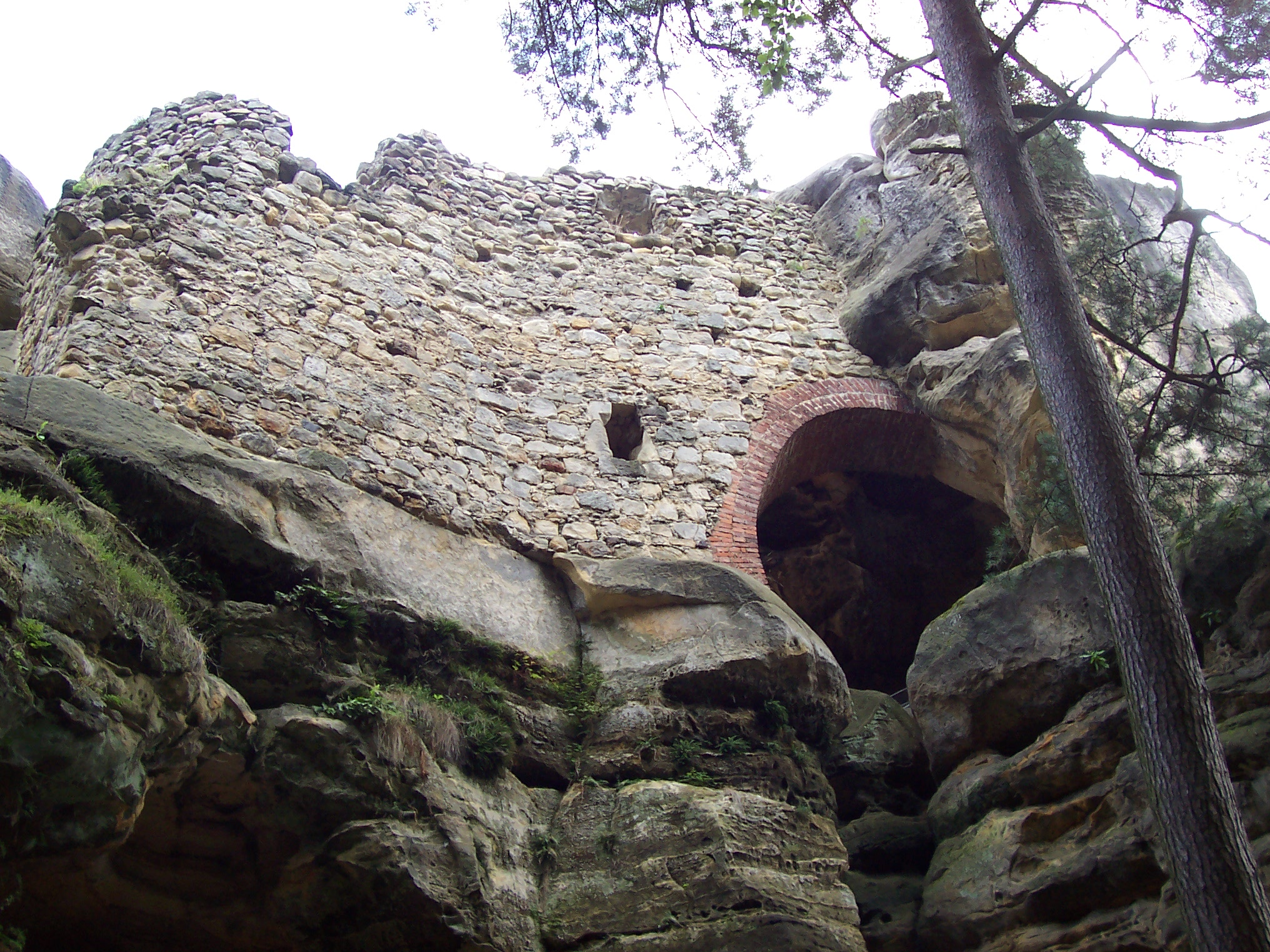 Hrad Rotštejn, jedna ze zbylých zdí / Castle Rotštejn, one of remaining walls